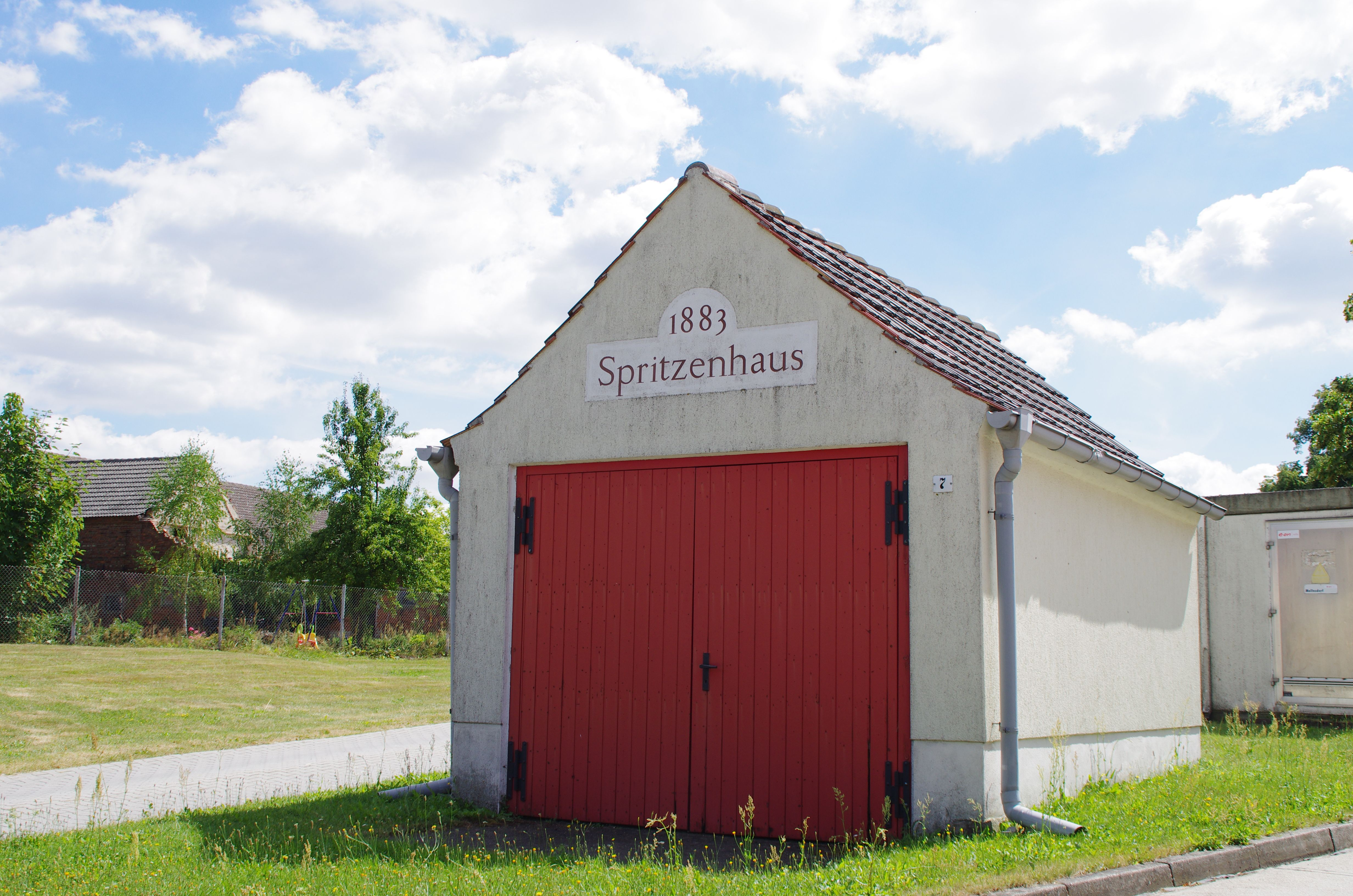 Niedergörsdorf Ortsteil Mellnsdorf in Brandenburg. Das Spritzenhaus wurde 1883 erbaut. Es befindet sich südlich des Dorfteiches und nördlich des Dorfangers.